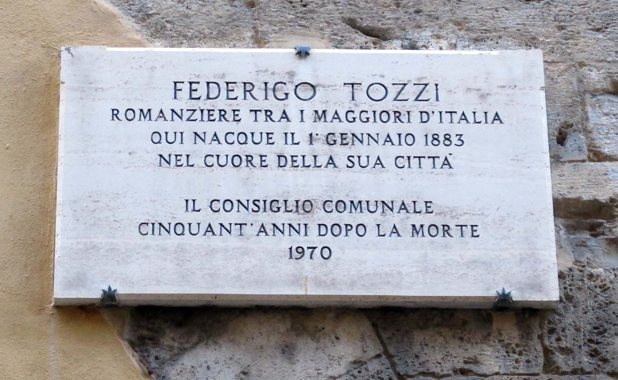 Banchi di Sotto e dintorni, Siena